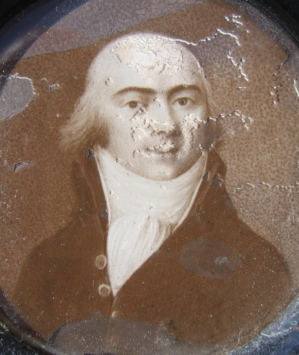 Bildnis Johann Wilhelm Wernher